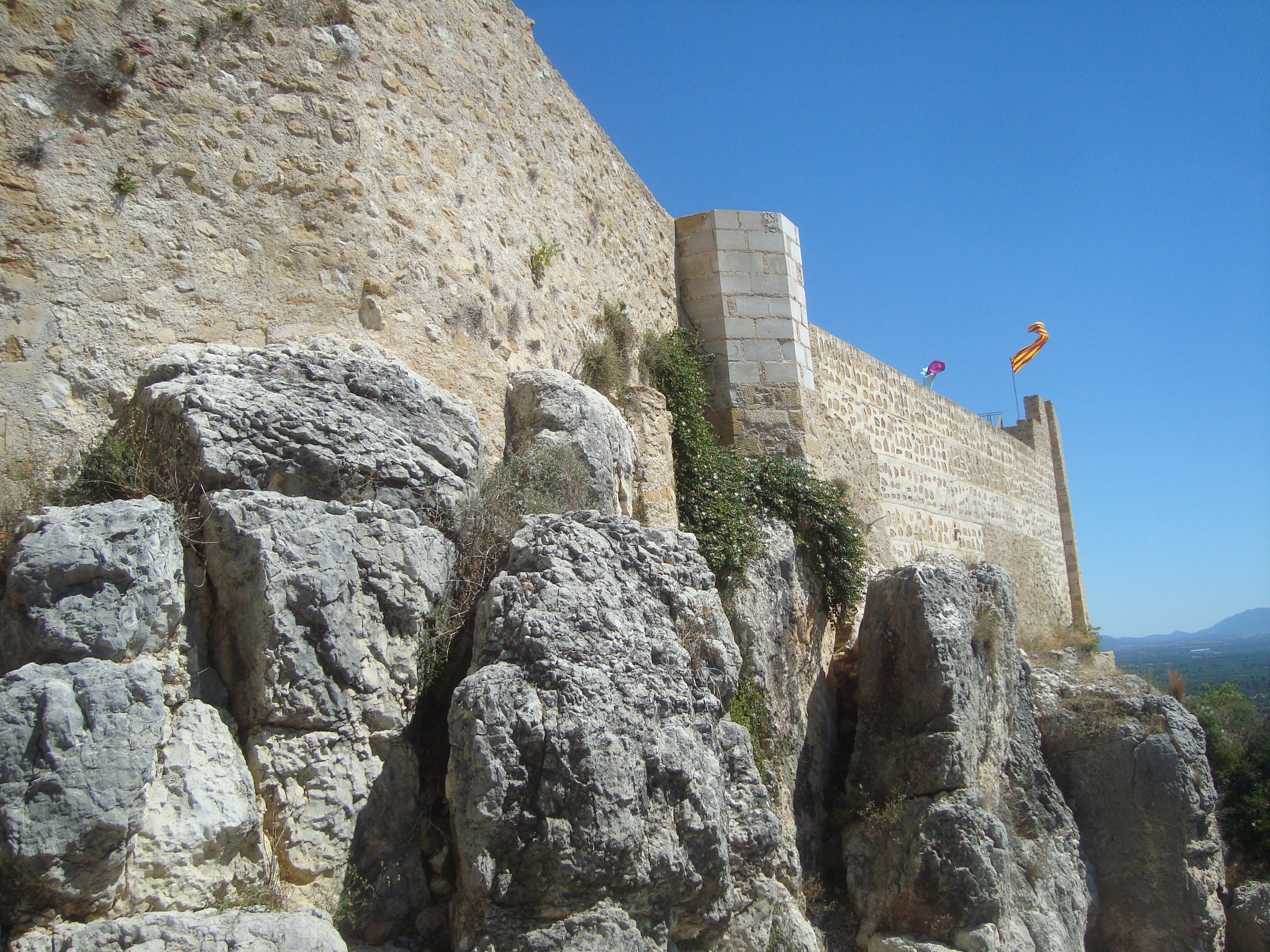 Castell de Cervera (Cervera del Maestrat)